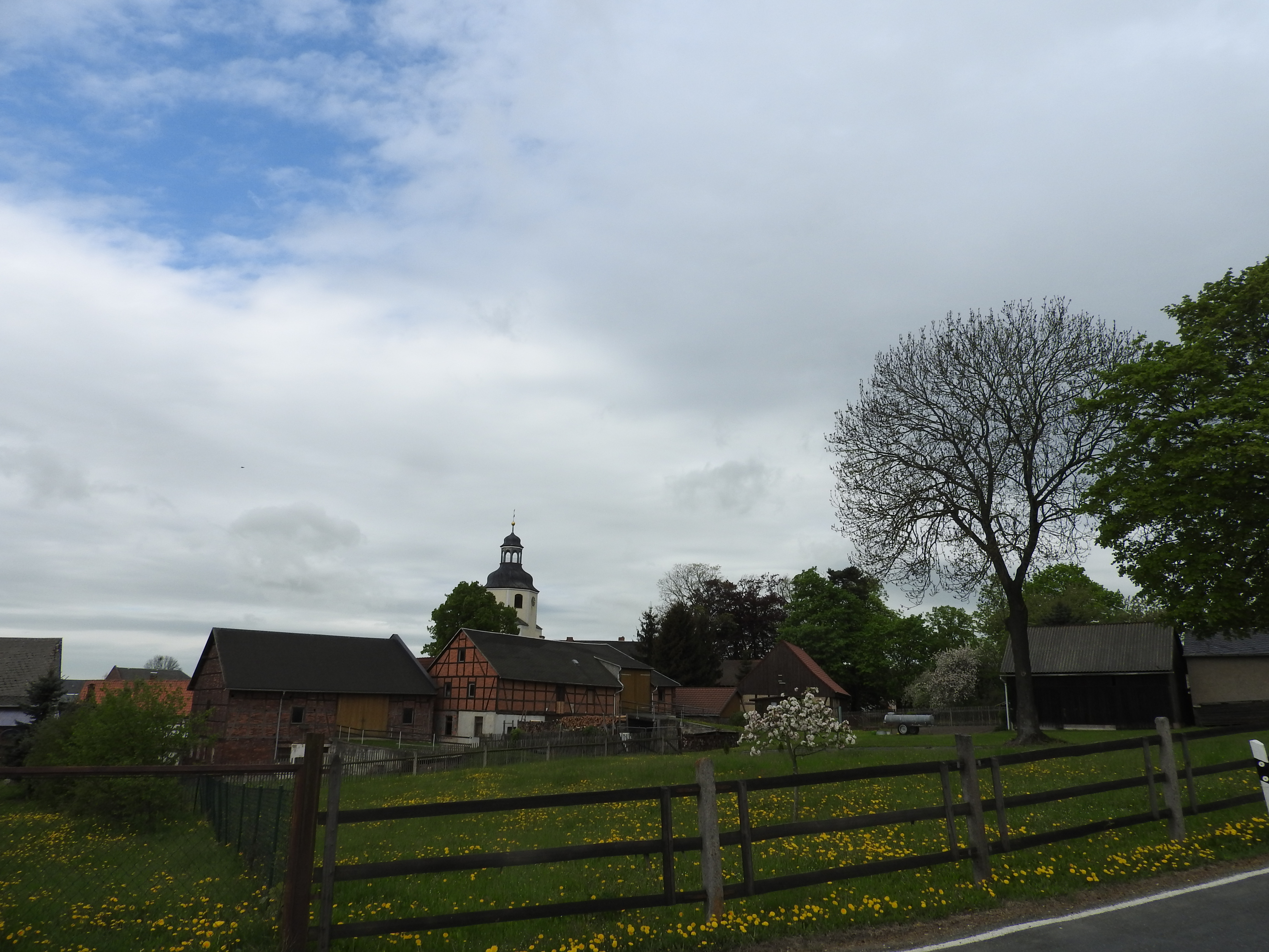 Blick auf Dittersdorf, Thüringen